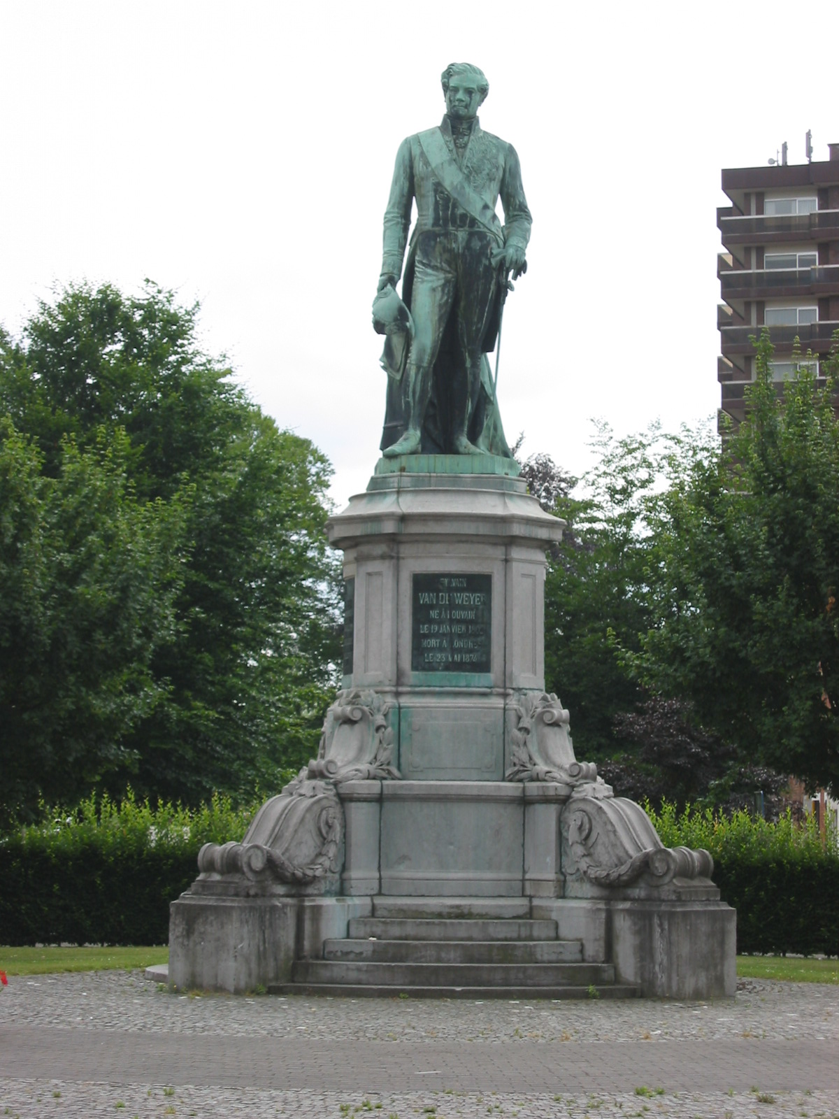 Het standbeeld van Van de Weyer op de Kapucijnenvoer in Leuven. Gemaakt door Charles Geefs in 1876